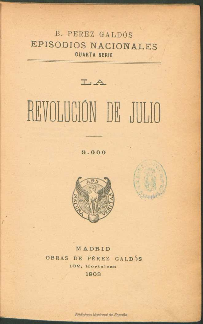 La revolución de julio Autor: Pérez Galdós, Benito (1843-1920) Fecha: 1903 Datos de edición: Madrid, Obras de Pérez Galdós, Esta. Tip. de la Viuda e Hijos de Tello